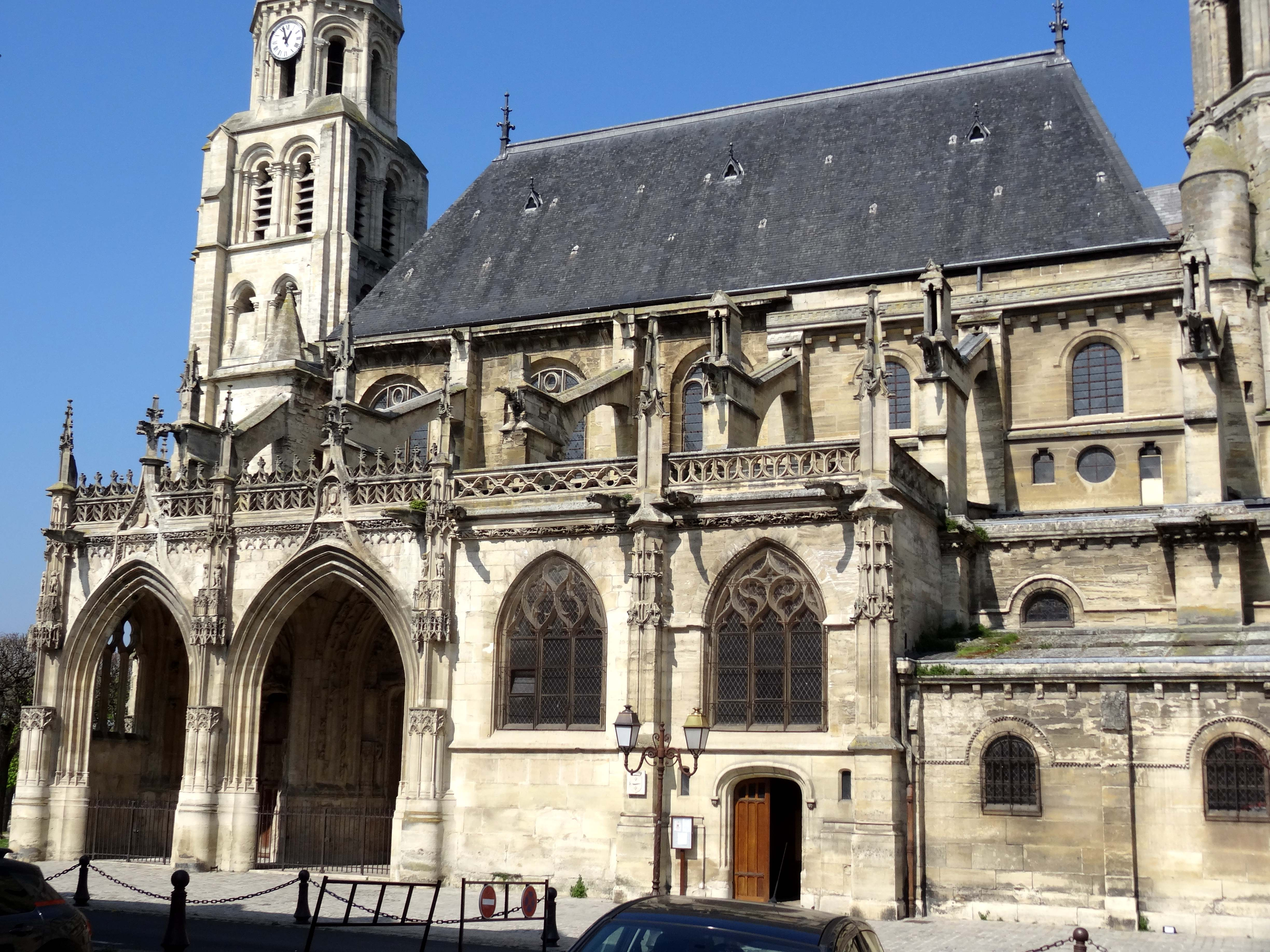 Collégiale Notre-Dame de Poissy - voir titre.